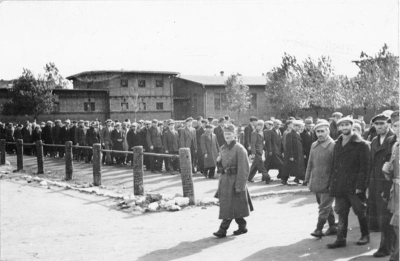 Polen, Bromberg, Juden im Internierungslager Juden im Internierungslager in Bromberg (Bydgoszcz).